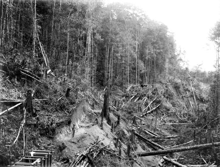 Negatief. Gekapt bos in de Gomorroh-vallei voor de aanleg van de hydraulische buisleiding, Singkep Tin Maatschappij, Riouw